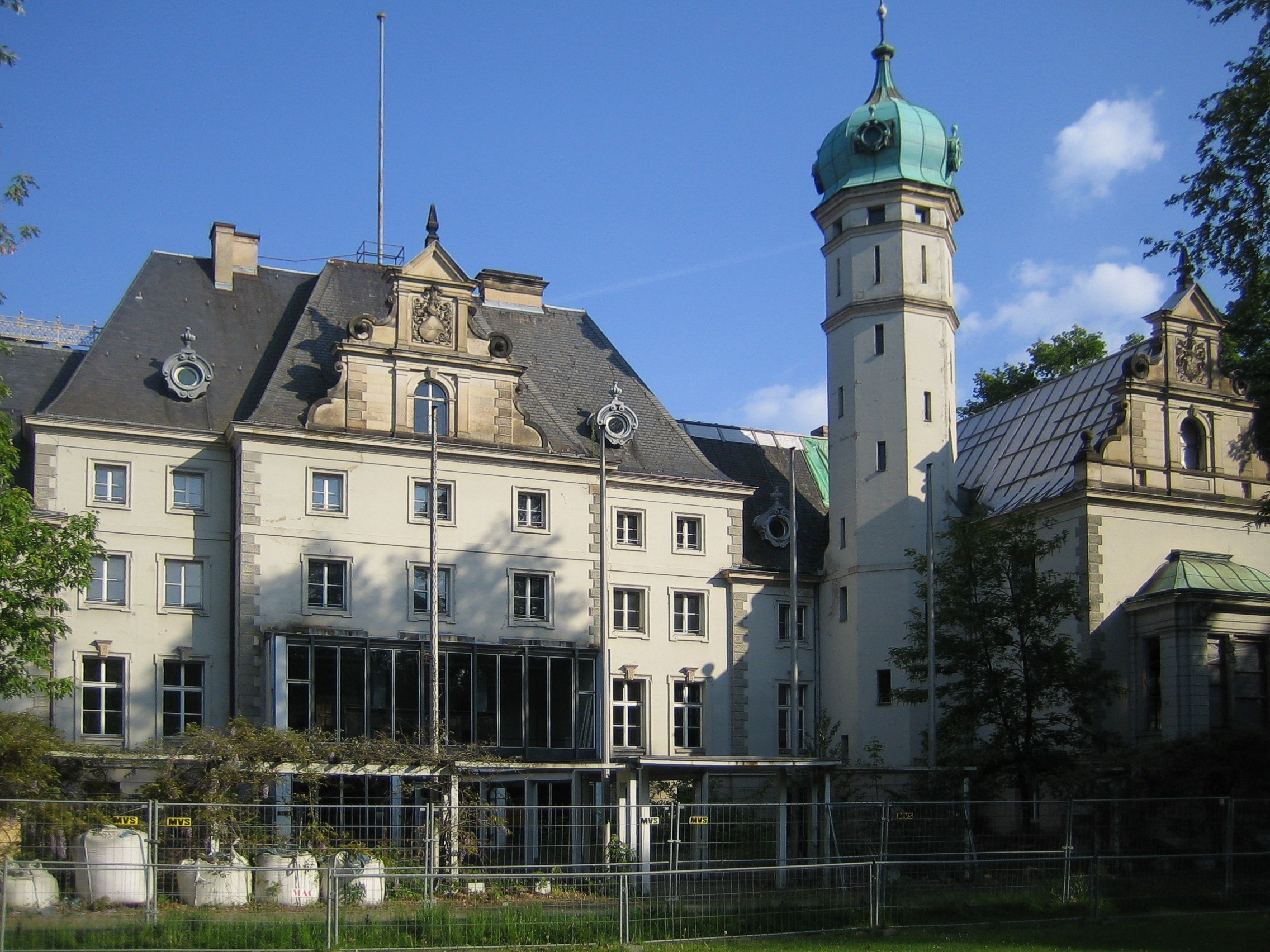 Jagdschloss Glienicke bei Berlin. Zustand Mai 2009.